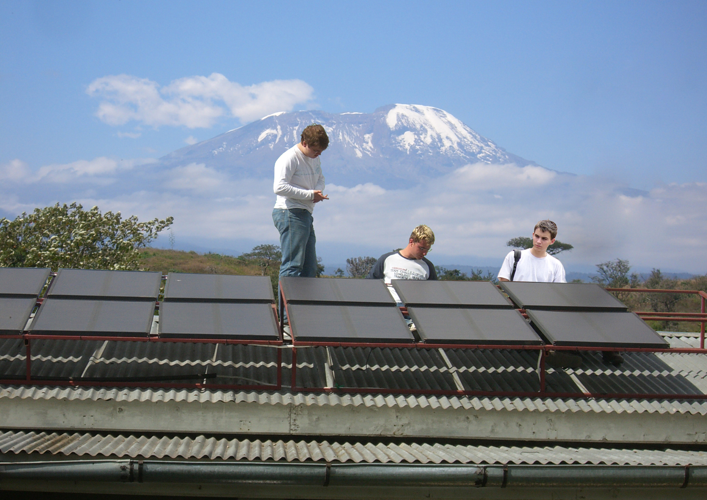 Installation einer Fotovoltaikanlage in Tansania